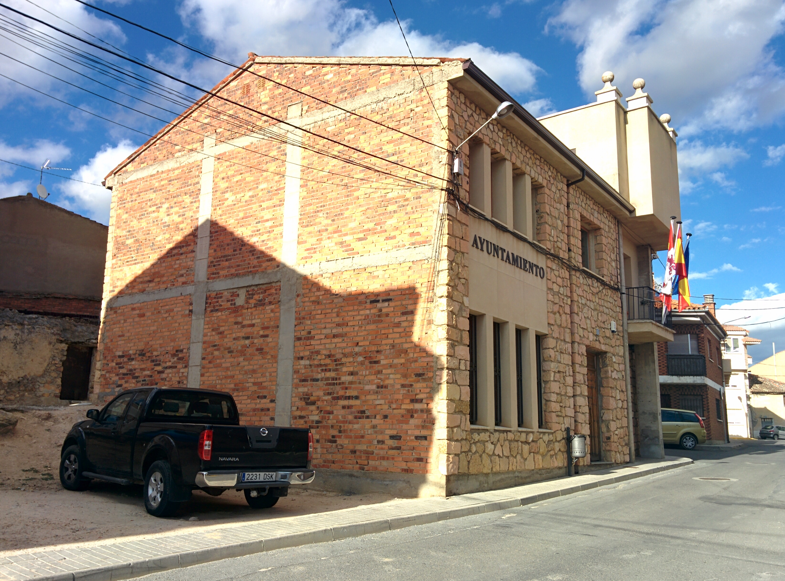 Ayuntamiento de La Lastrilla (Segovia, España).